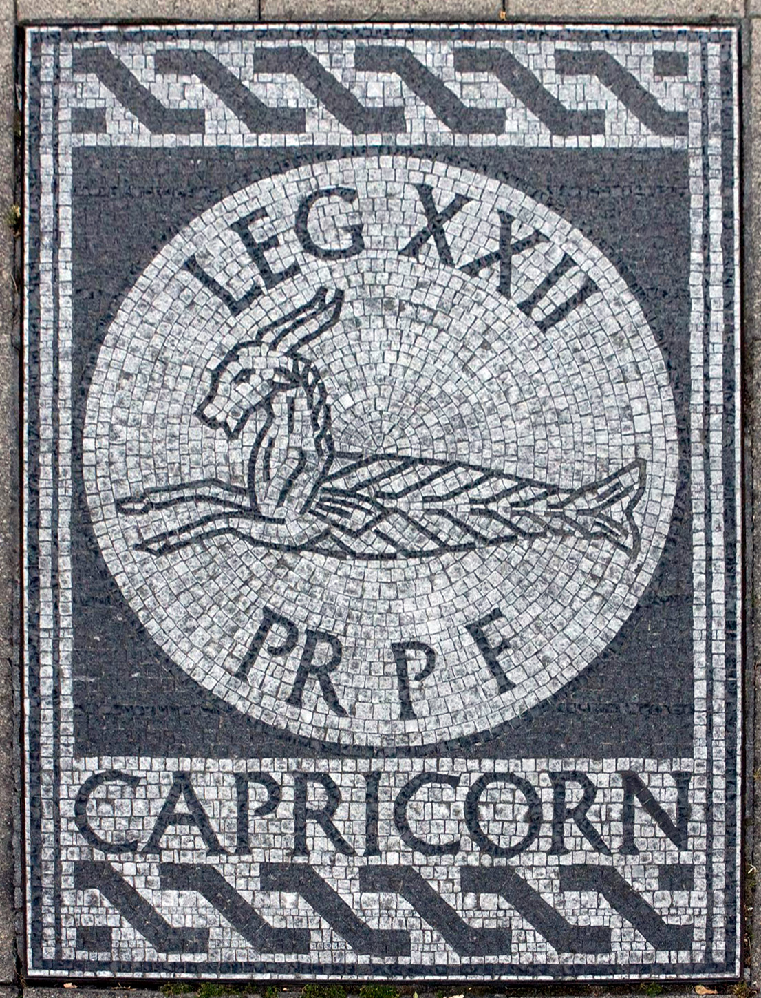 Abbildung des Wahrzeichens (Capricorn) der Legio XXII Primigenia in einem historisierenden Mosaik in der Wohnanlage Kästrich, Mainz.